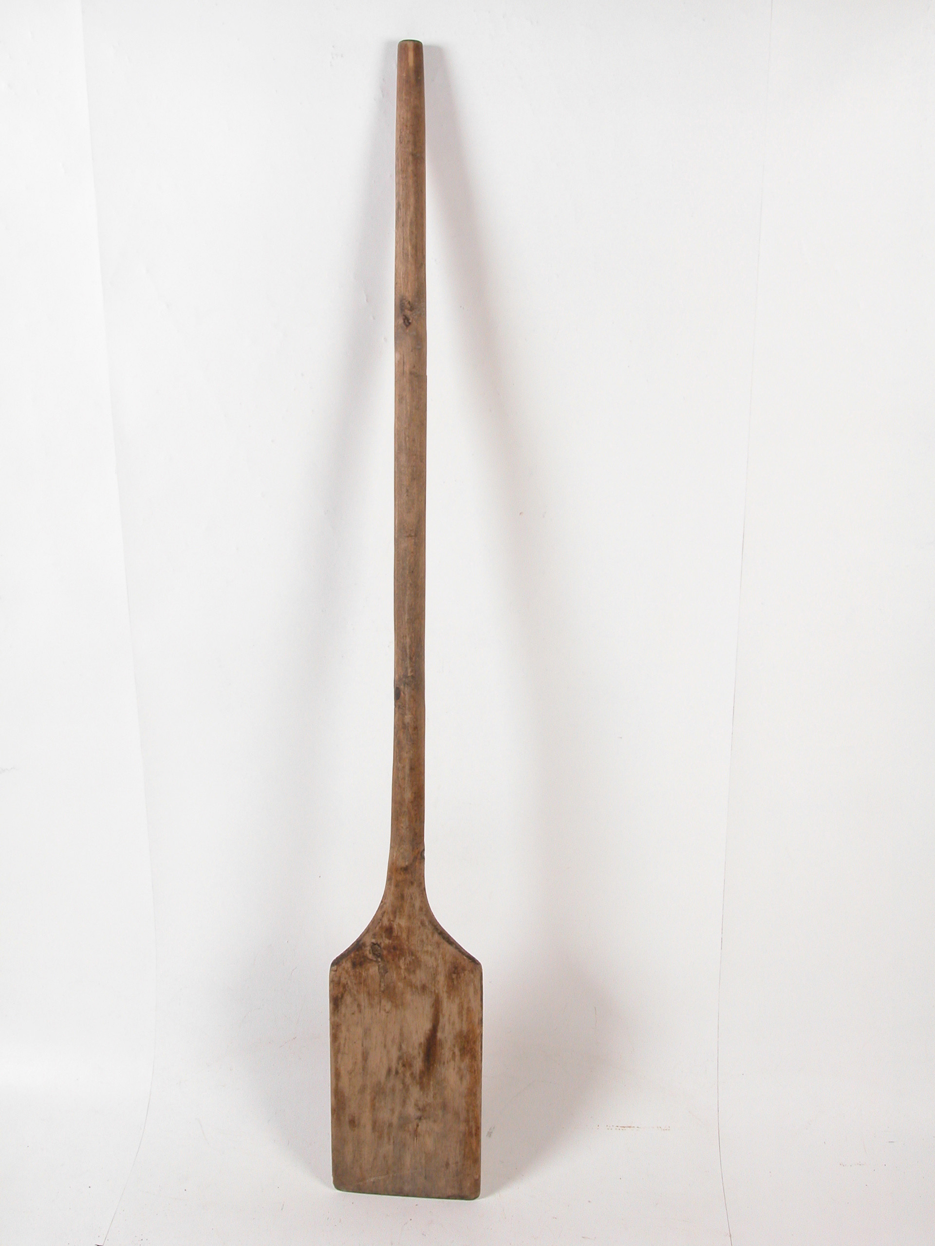 Leivalabidas